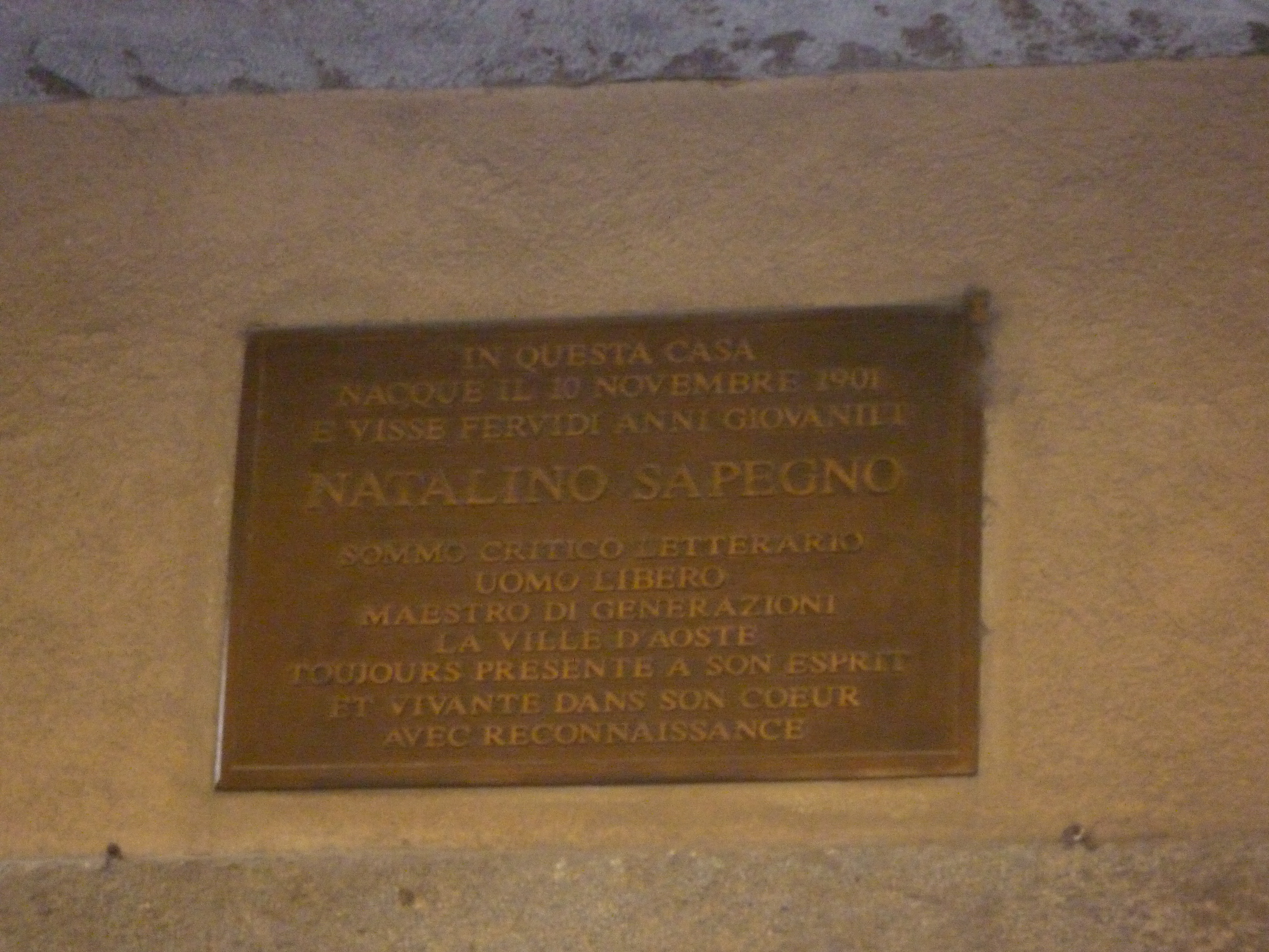 Plaque dédiée à Natalino Sapegno à Aoste